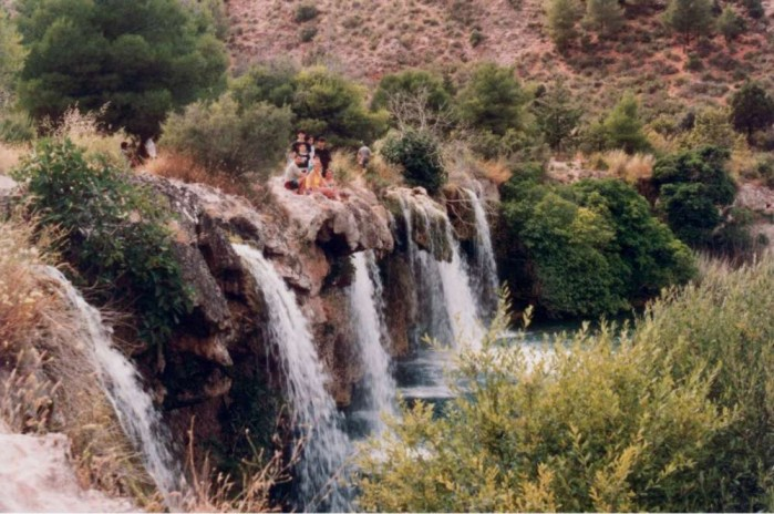 Salto en cascada desde la laguna Santos Morcillo a la Batana (Albacete) Fotografía realizada por Josemanuel